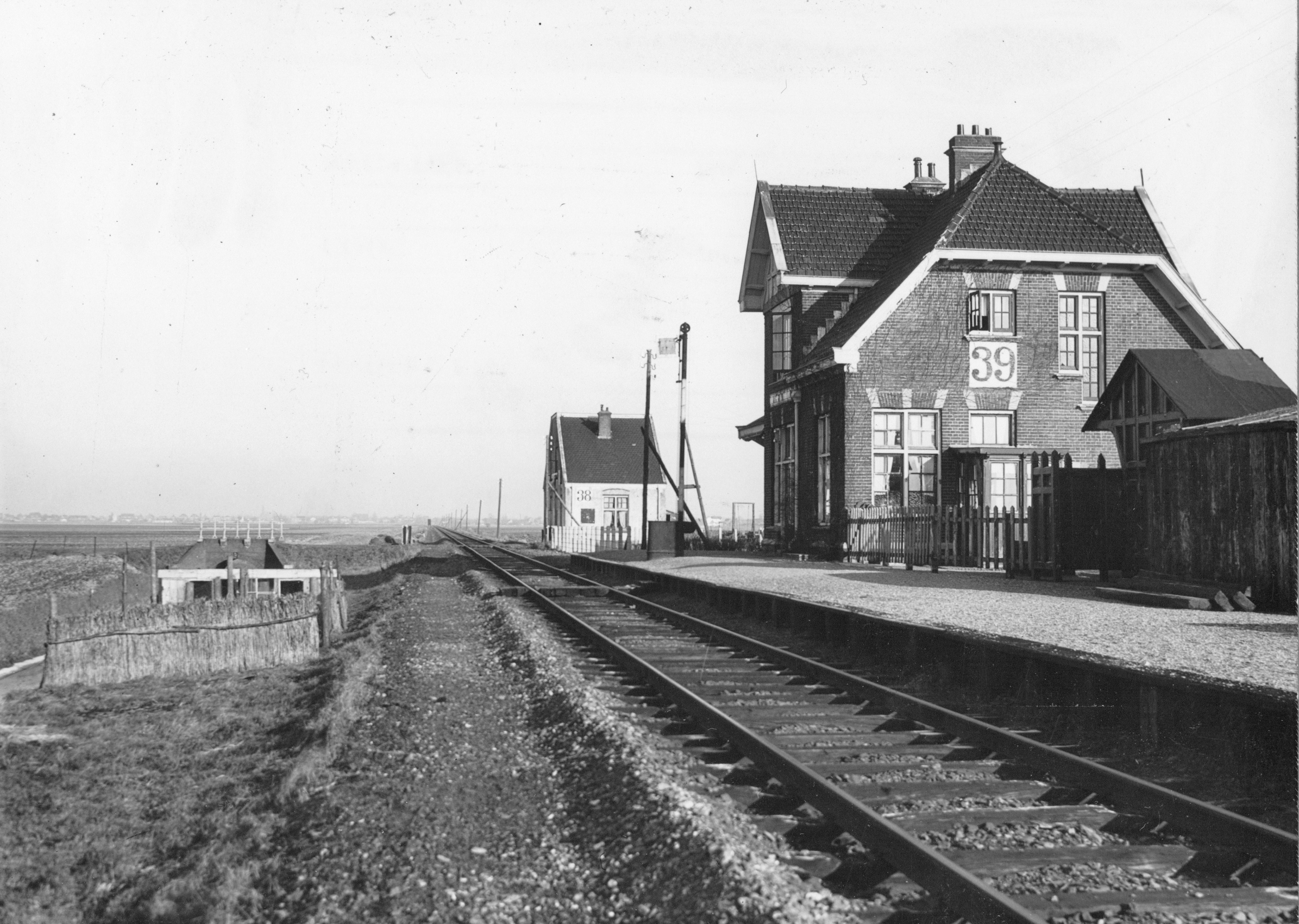 Gezicht op het N.S.-station Legmeerpolder (lijn Amsterdam Haarlemmermeer-Uithoorn) met op de achtergrond dienstwoning nr. 38.